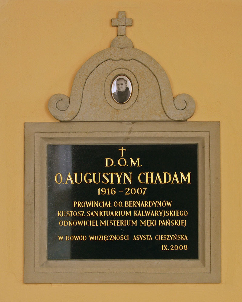 Tablica pamiątkowa w klasztorze kalwaryjskim poświęcona o. Augustynowi Chadamowi, odsłonięta 28 września 2008 roku.